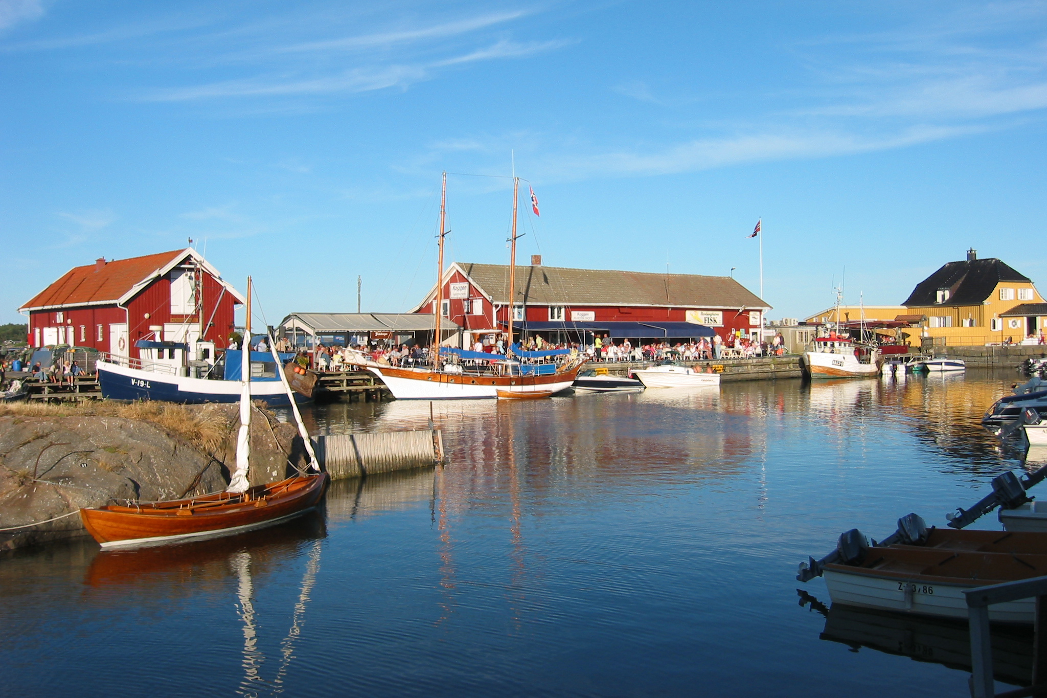 Fra brygga i Nevlunghavn, 2005